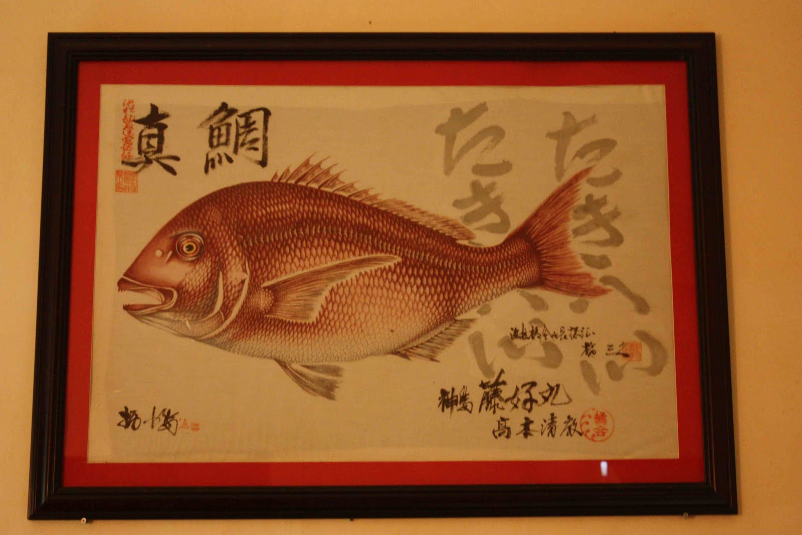 ejemplar de gyotaku de gran calidad